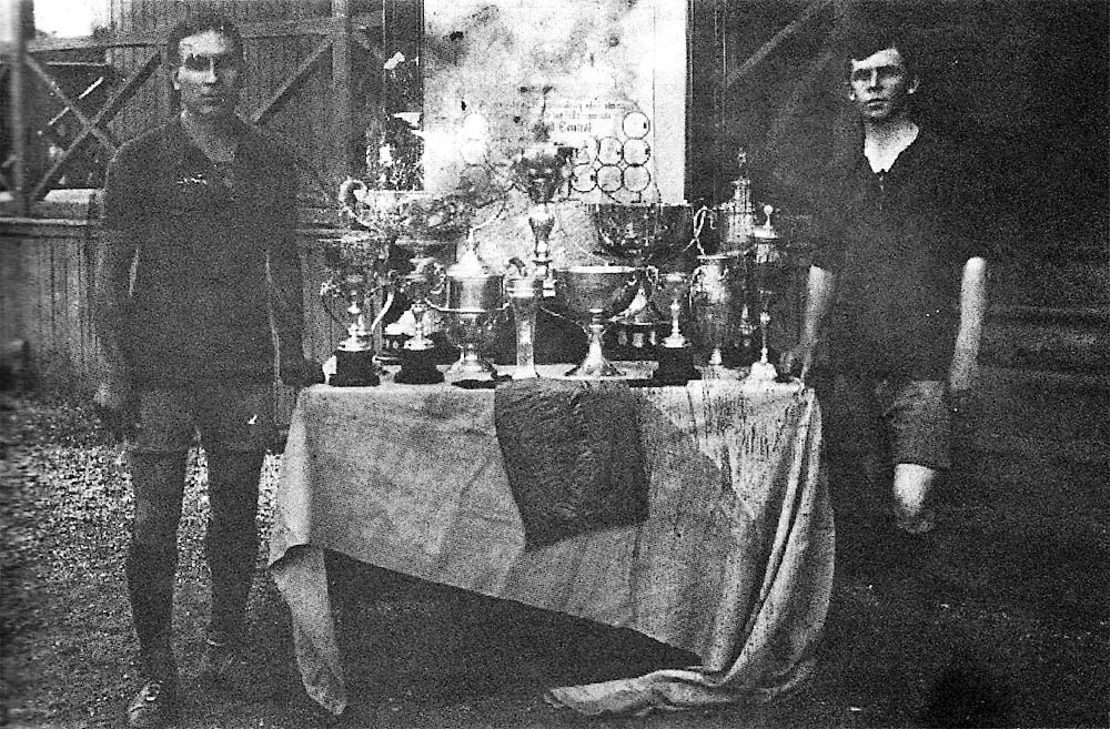 Zenón Díaz y Harry Hayes, dos baluartes de Rosario Central posan junto a los trofeos obtenidos por la institución en 1916.